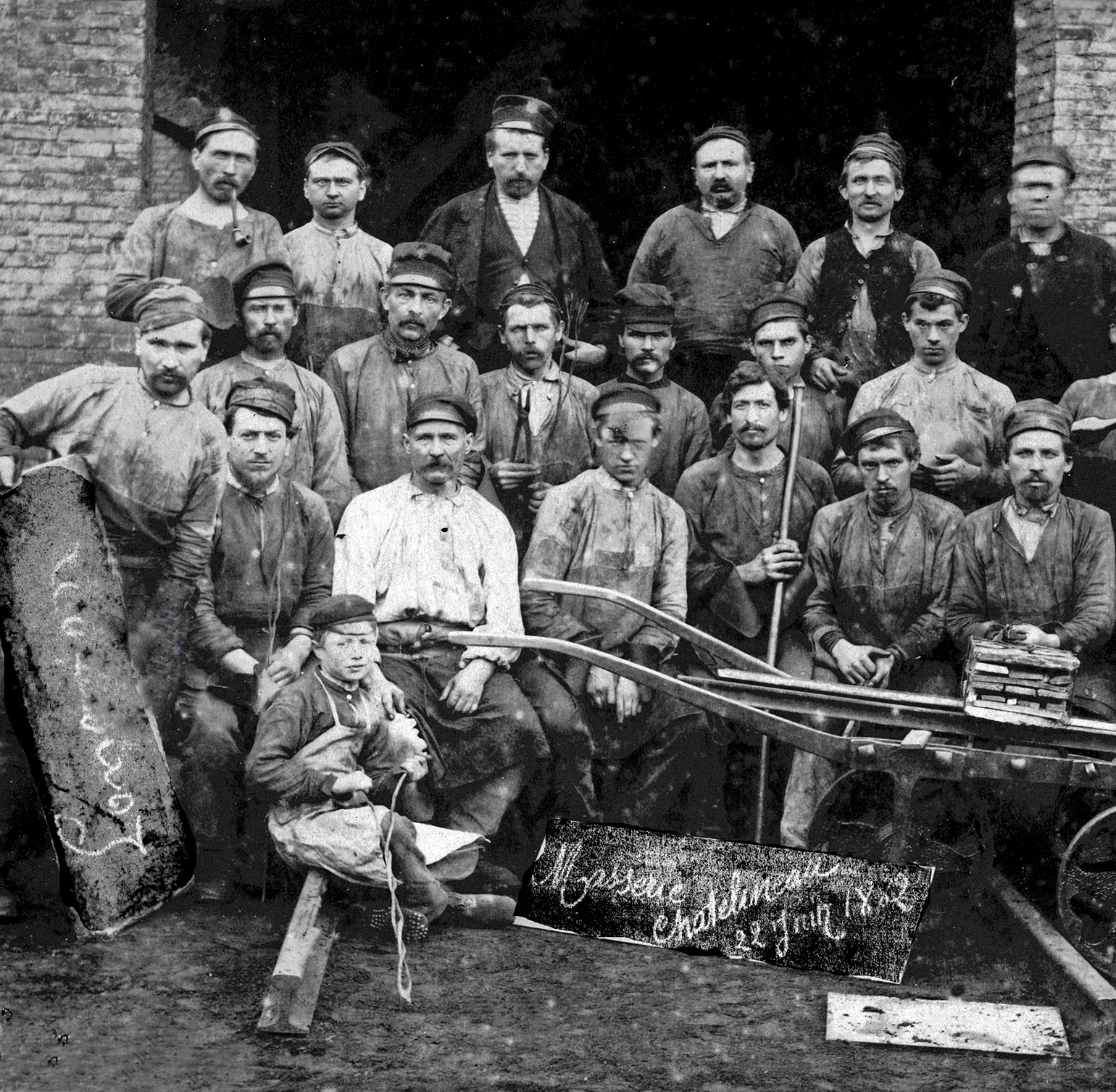 Vieux métier de l'industrie métallurgique.